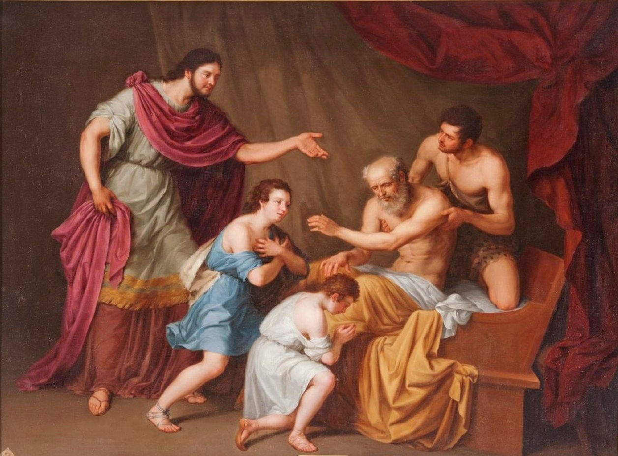 La obra representa al patriarca hebreo Jacob bendiciendo a sus nietos Efraín y Manasés, que darían nombre a dos de las doce tribus de Israel y eran hijos de José, hijo a su vez de Jacob.